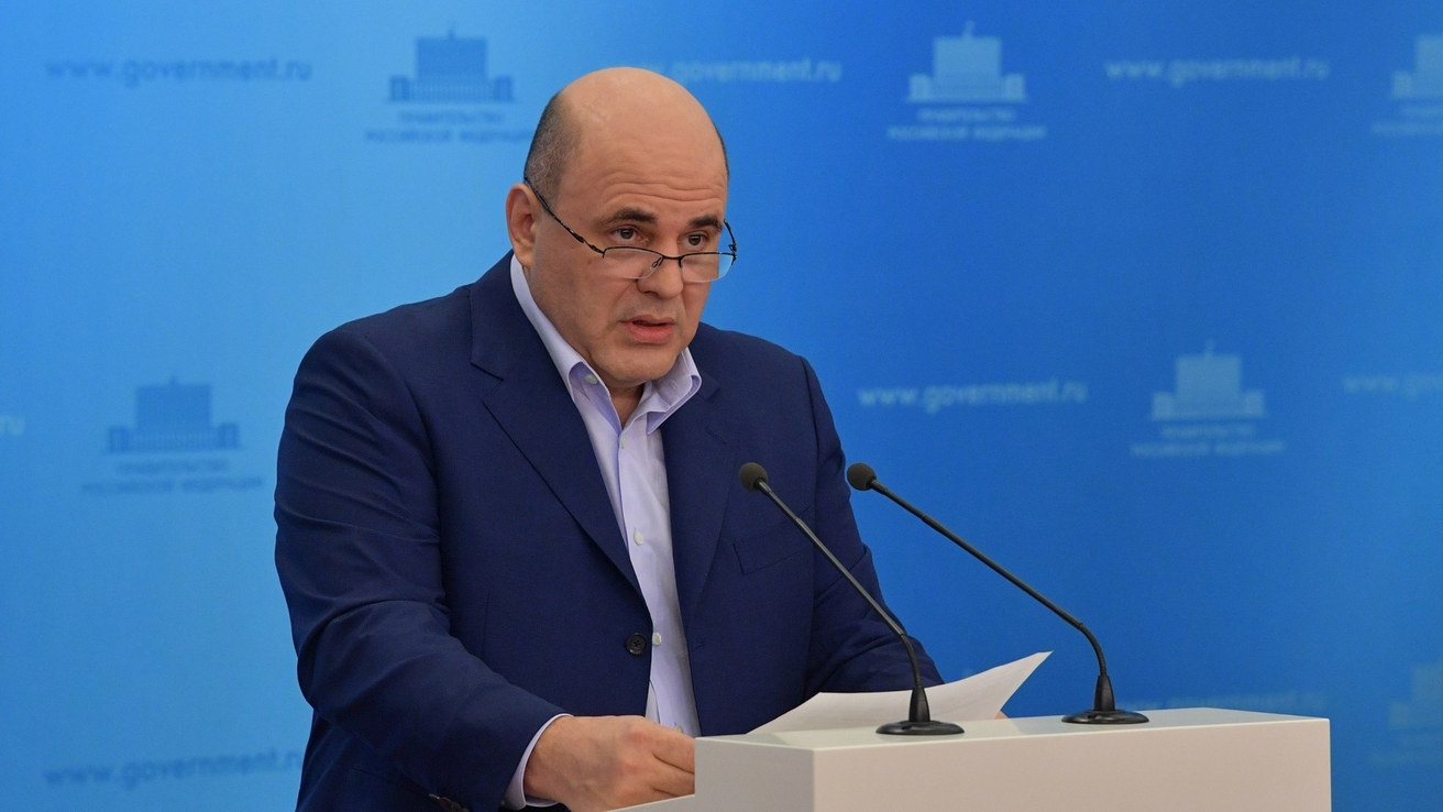 Выступление Михаила Мишустина на заседании стратегической сессии Координационного совета по борьбе с коронавирусной инфекцией